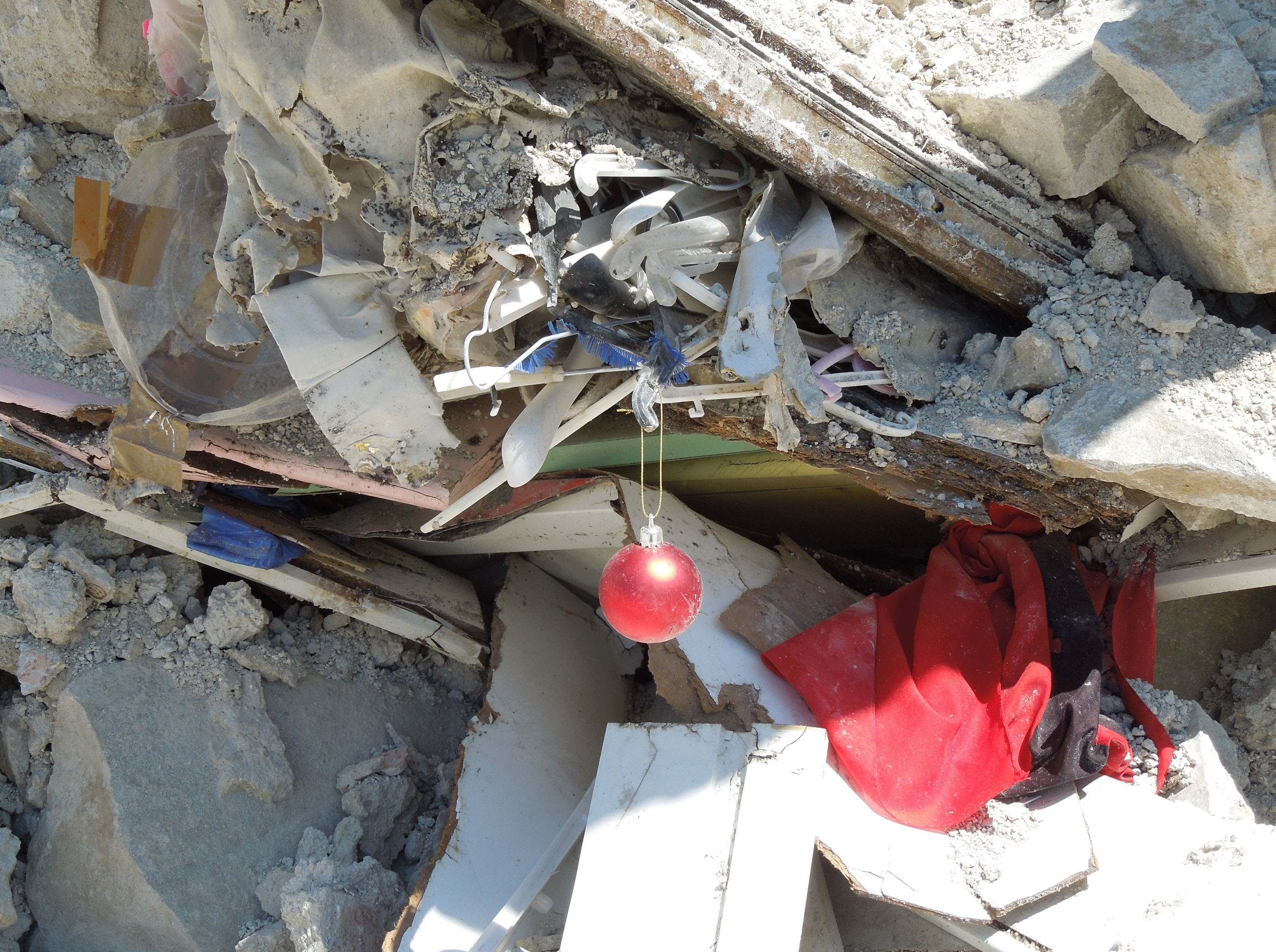 Particolare tra le macerie di Pescara del Tronto in provincia di Ascoli Piceno. Scatto eseguito all'interno della zona rossa il 27 luglio 2017.